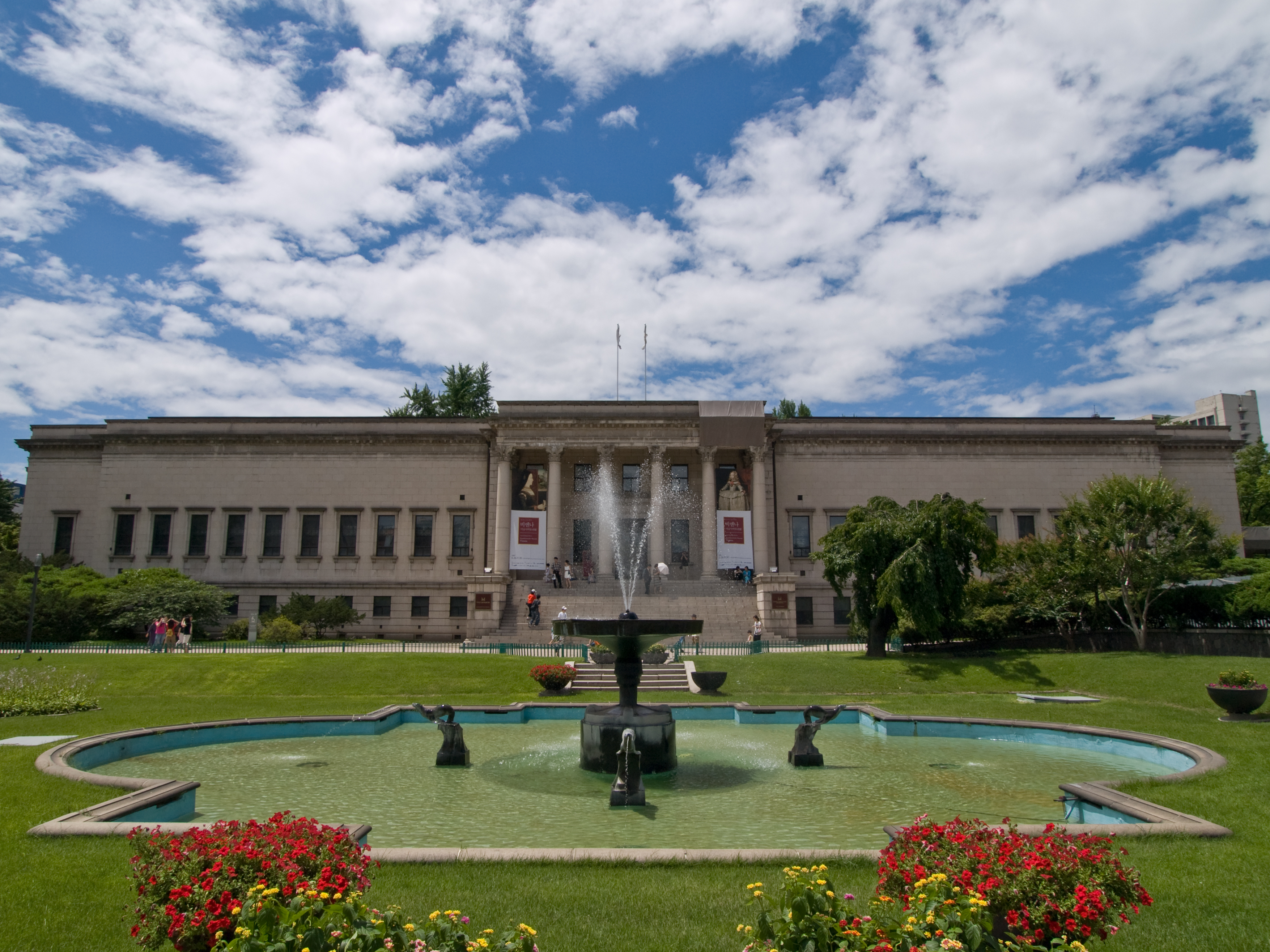 서울시 덕수궁 Deoksugung (Palace) in Seoul, Korea